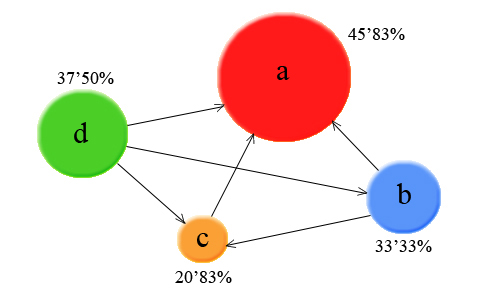 Exemple del càlcul del PageRank de les pàgines web A, B, C i D.